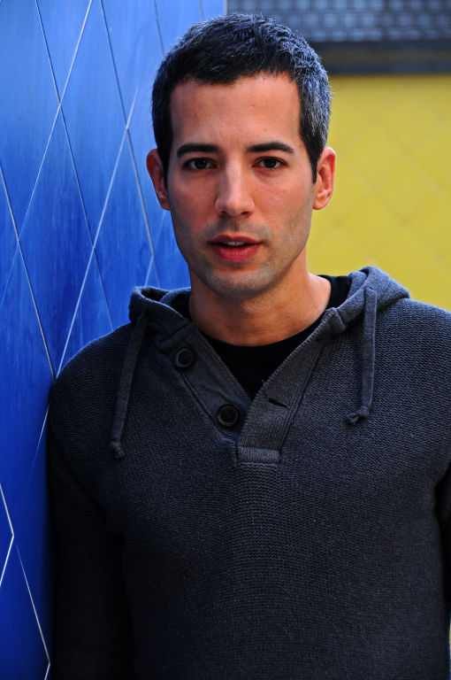 Presenta el Telediario Fin de Semana TVE